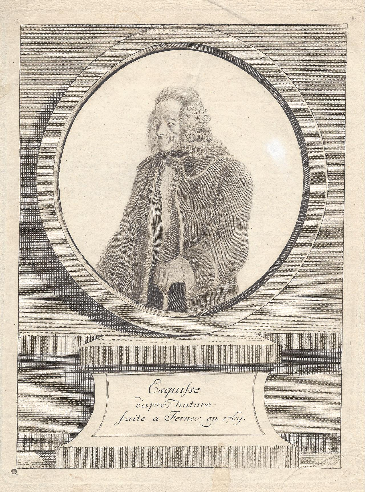 Jean Huber-Voltaire: Skizze Voltaires in Ferney 1769, Kupferstich